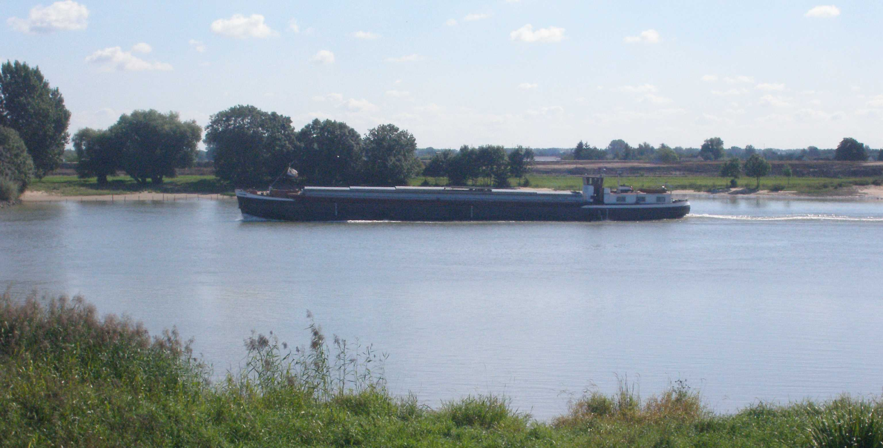 The river Lek near Jaarsveld (Lopik)